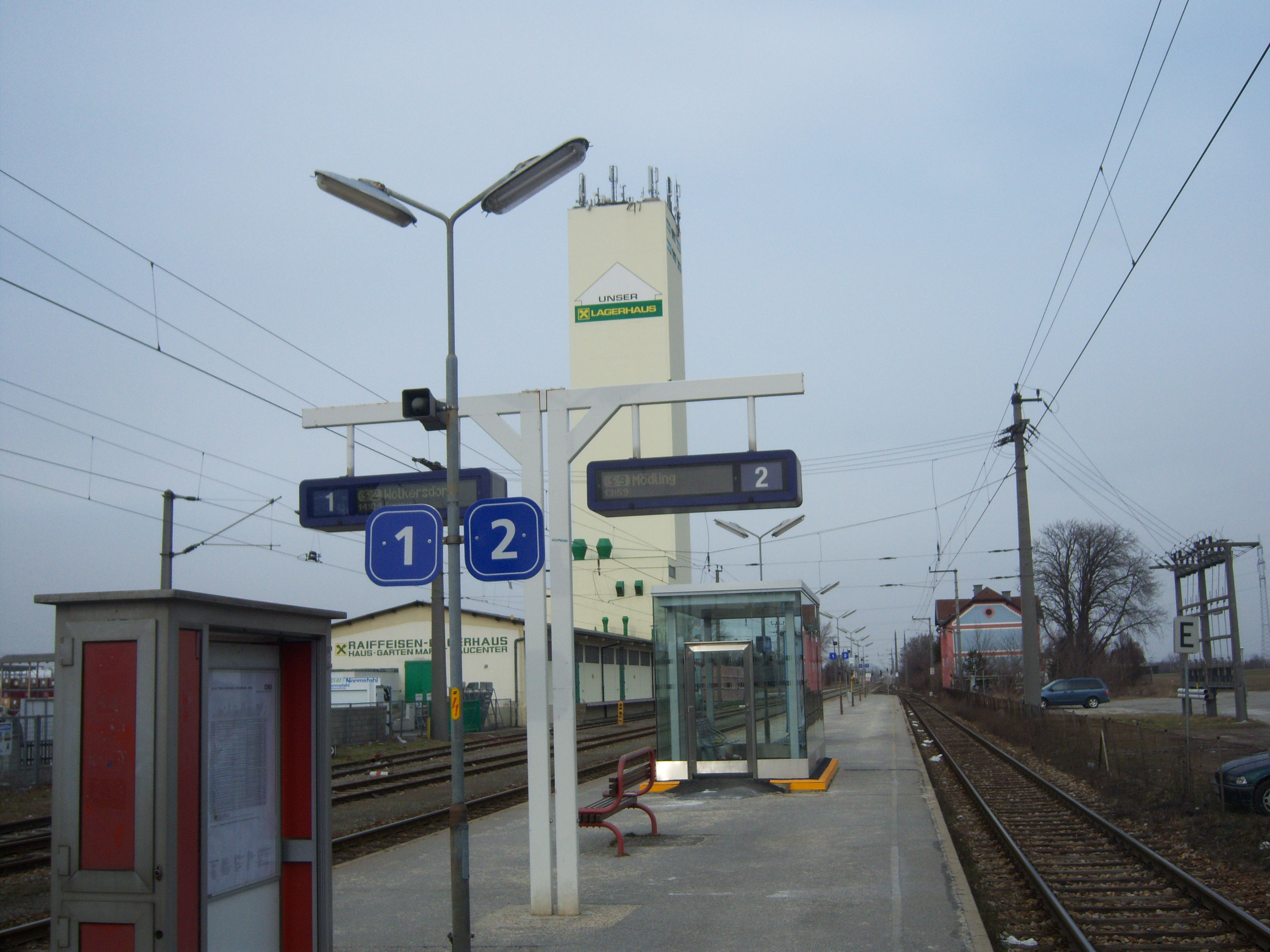 Bahnhof Gerasdorf